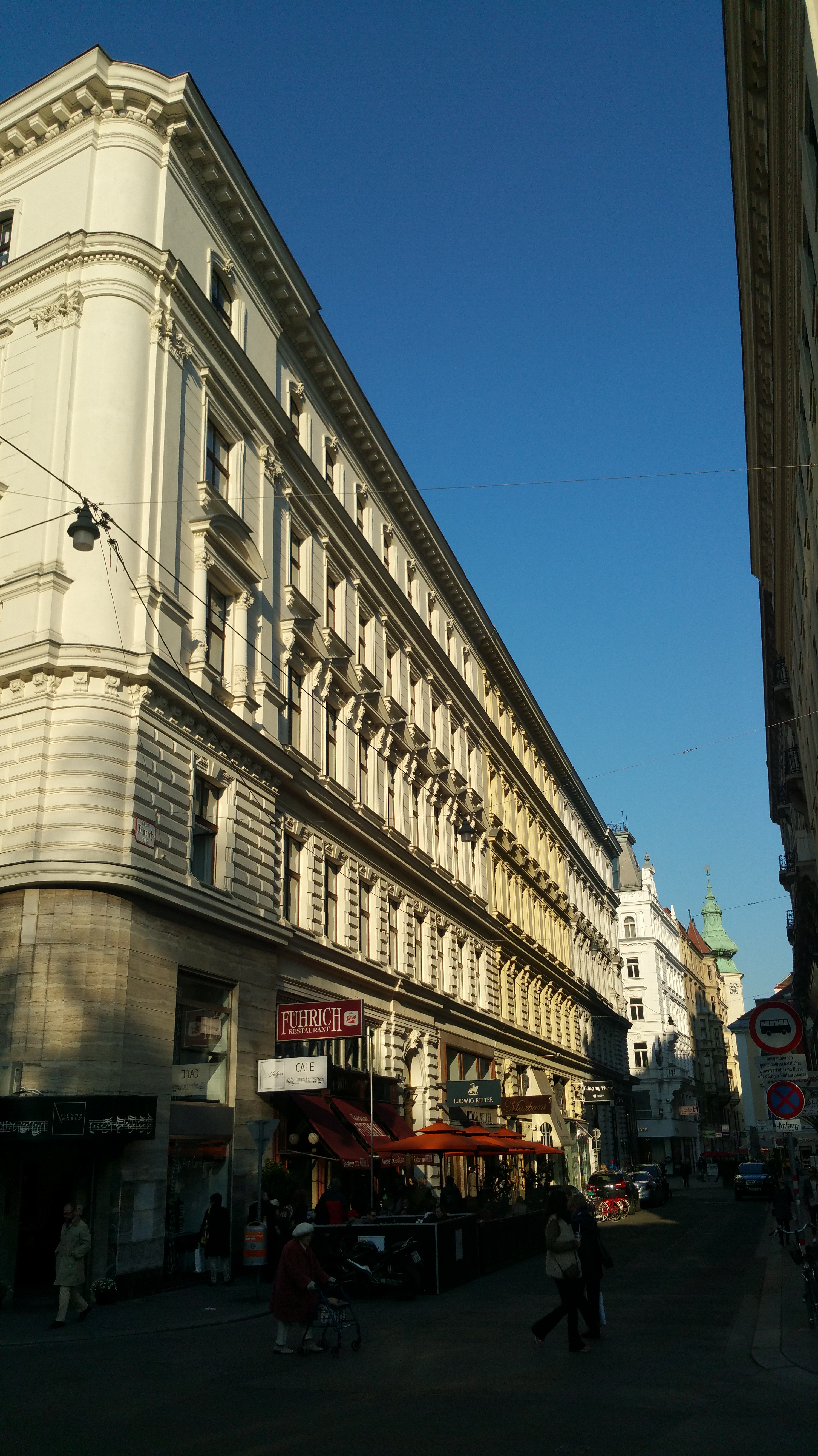 Haus Gomperz (1877) von Otto Thienemann, Führichgasse 6, Wien-Innere Stadt